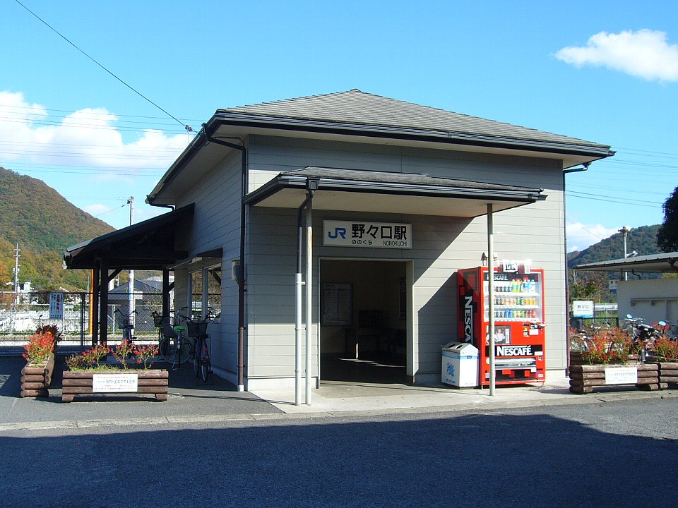 津山線野々口駅